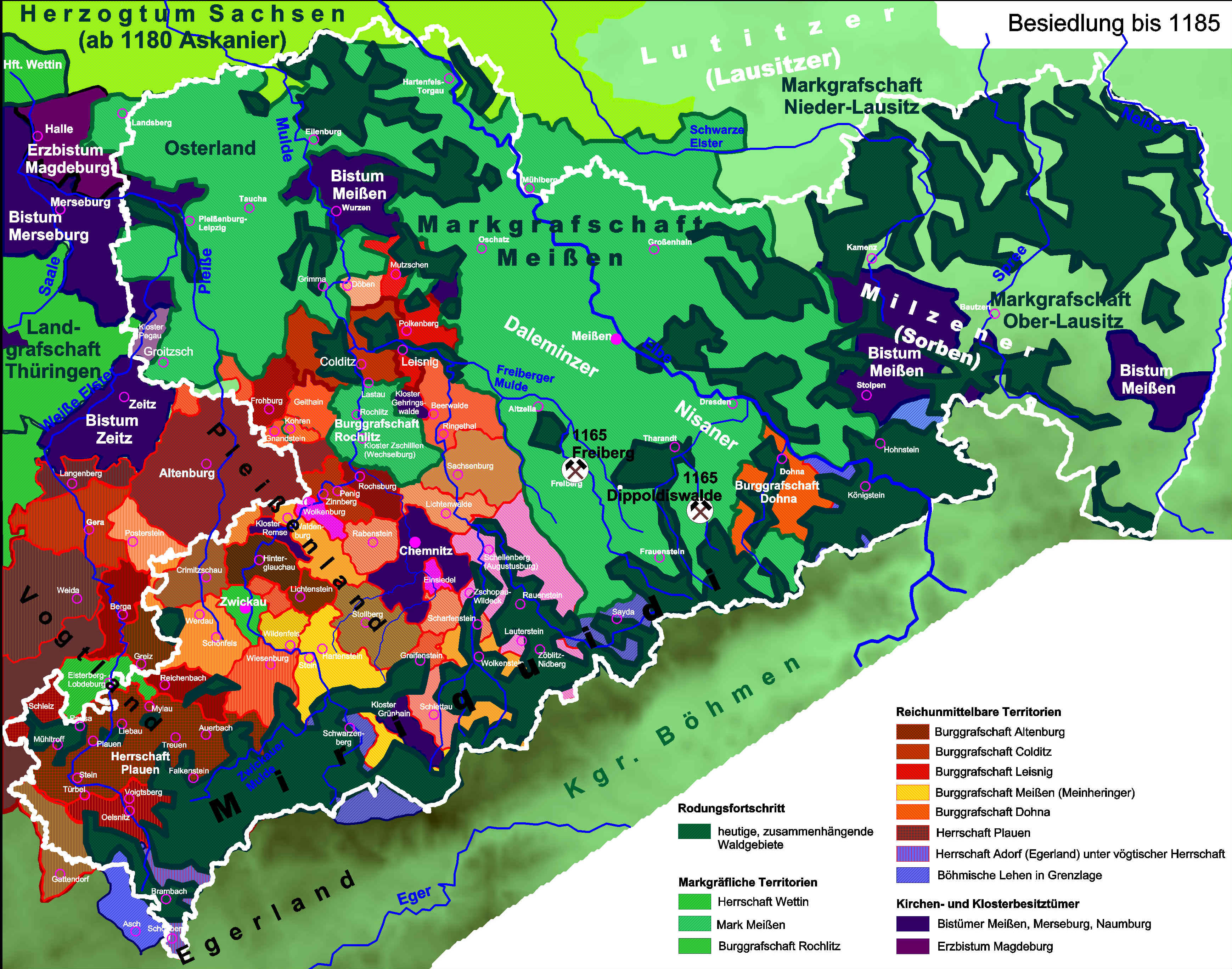 Herrschaften des Vogtlandes und des Pleißenlandes um 1185 n.C. (Digitalisierung aus verschiedenen Quellen)